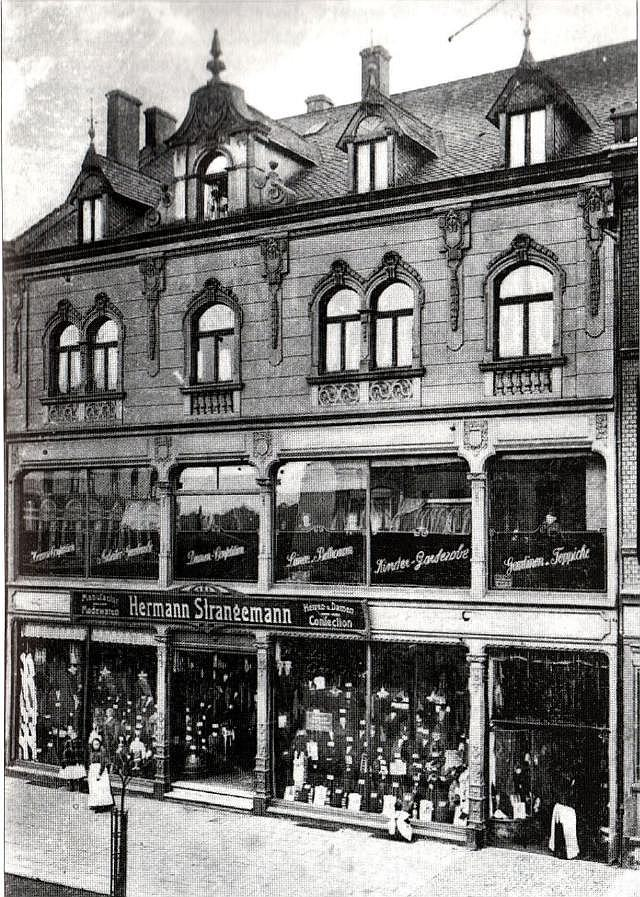 Foto aus der Gründerzeit